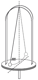 Péndulo de Foucault. Dispositivo ilustrativo.